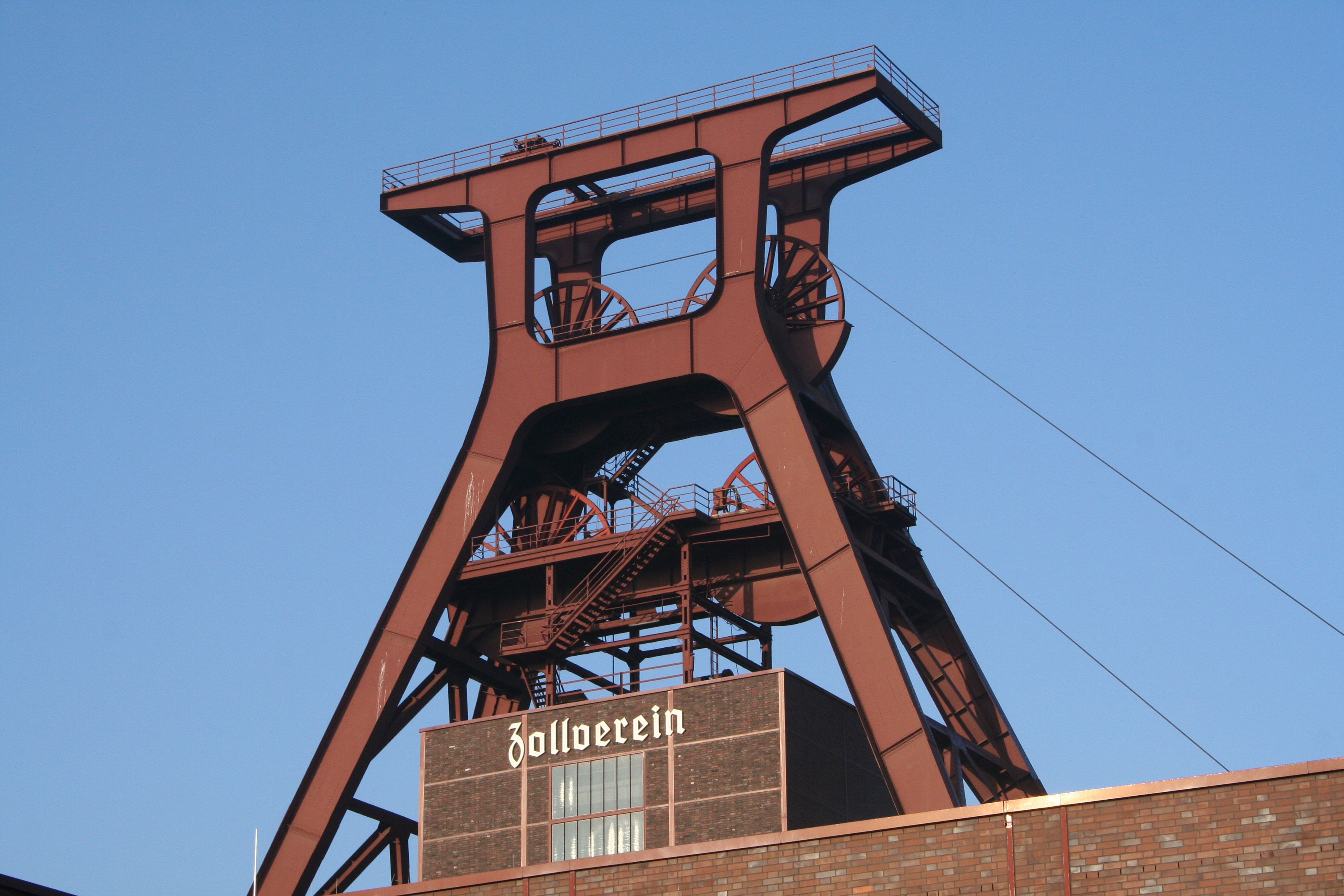 Zeche Zollverein